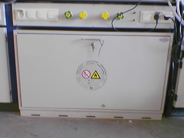 Sicherheitsschrank für brennbare Stoffe